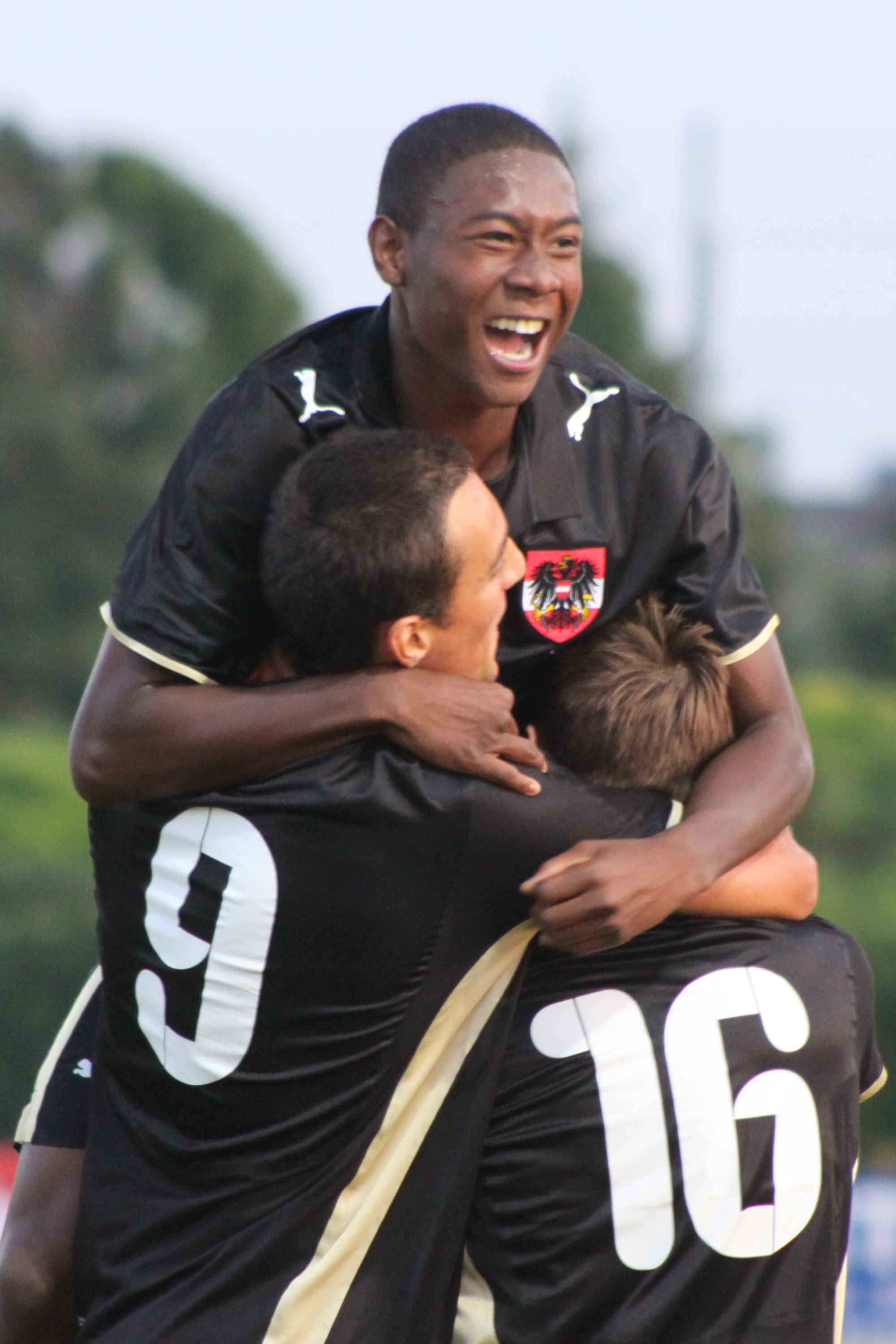 David Alaba (FC Bayern München) jubelt mit dem zweifachen Torschützen Atdhe Nuhiu (Nr. 9, SV Ried) und dem einfachen Torschützen Andreas Weimann (Nr. 16, Aston Villa) - Österreichische U-21-Fußballnationalmannschaft